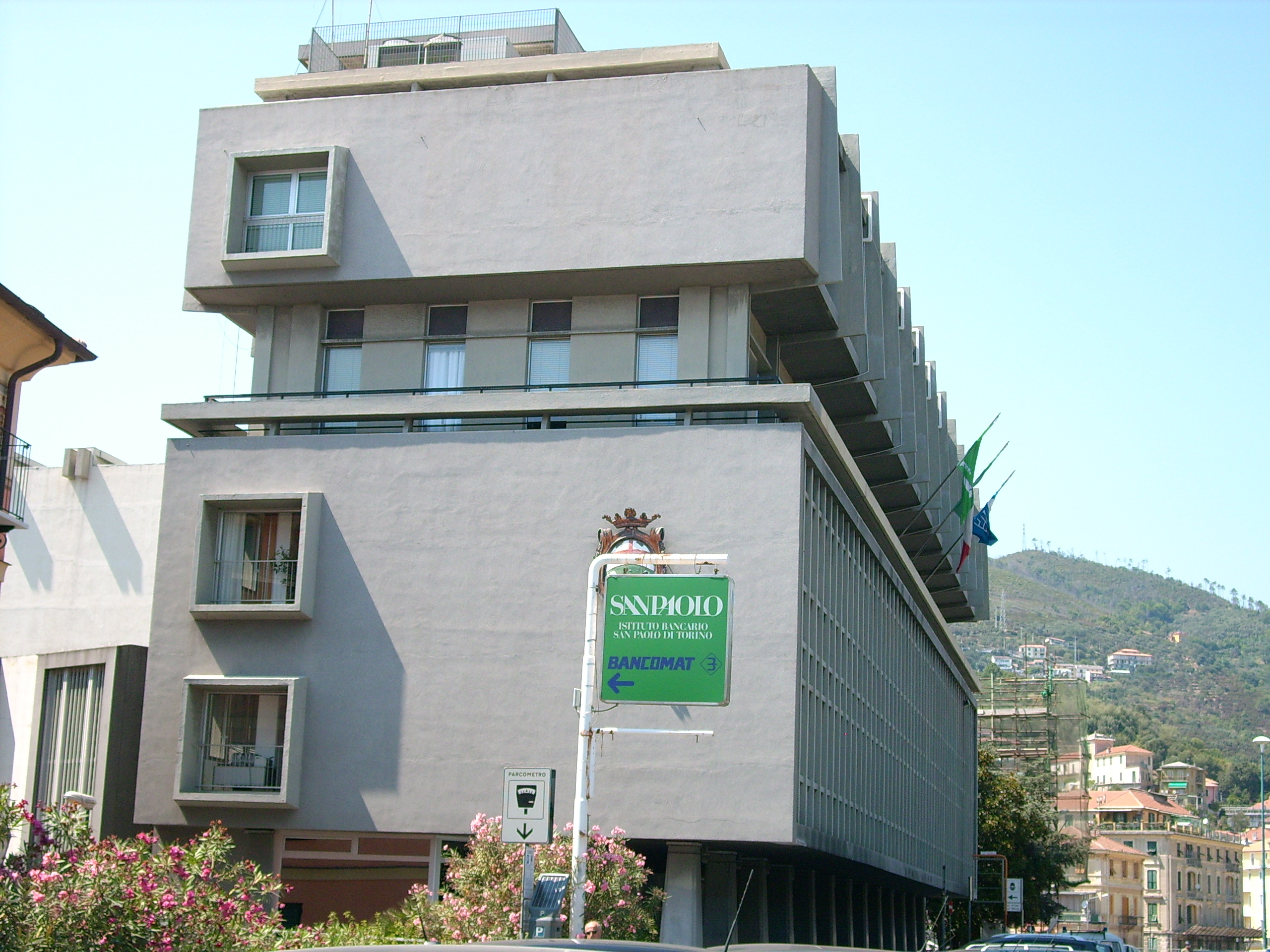 Municipio di Varazze, Liguria, Italia